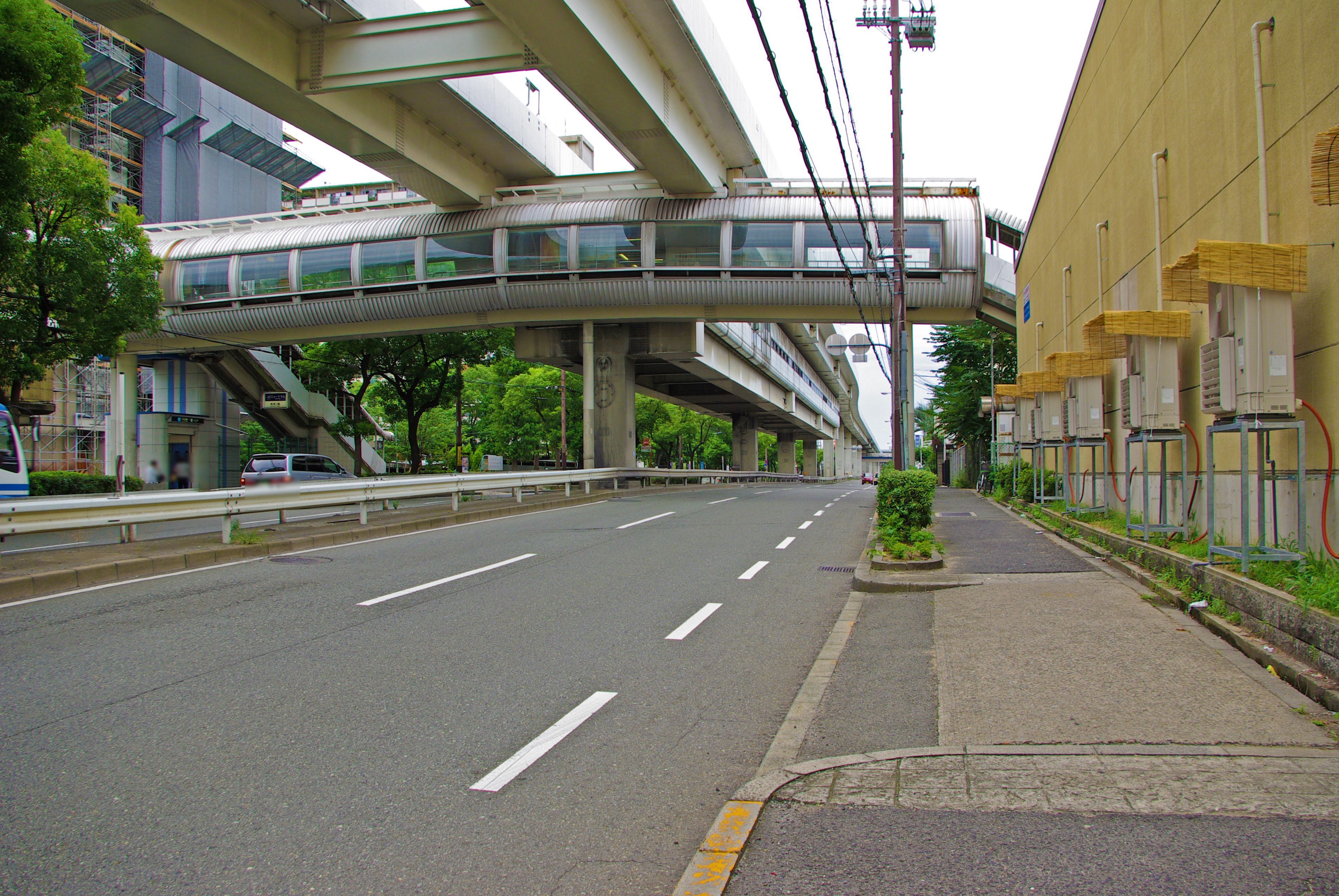 大阪市交通局南港ポートタウン線南港口駅